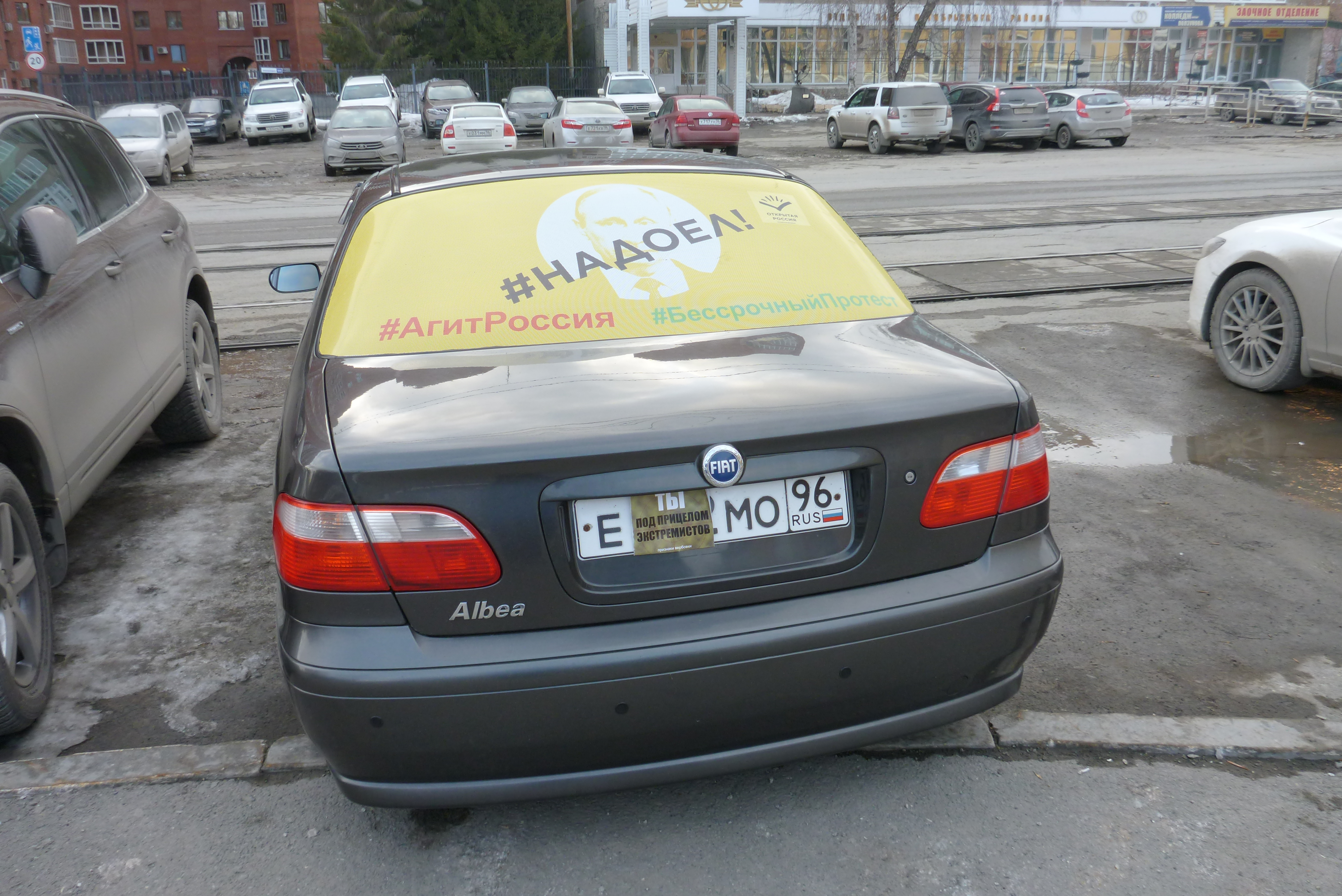 Автомобиль в Екатеринбург, 23 марта 2019 года. На нем изображена символика Открытой России